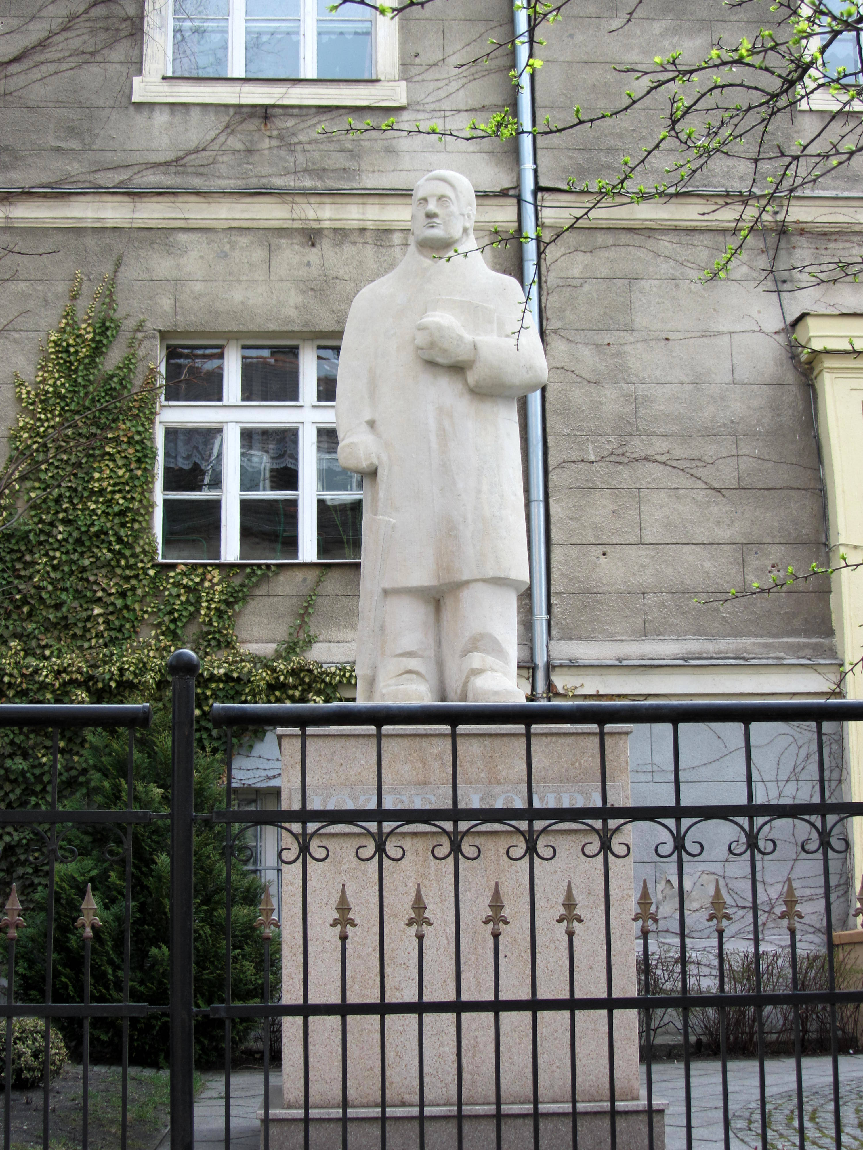 Denkmal für Jozef Lompa in Oppeln